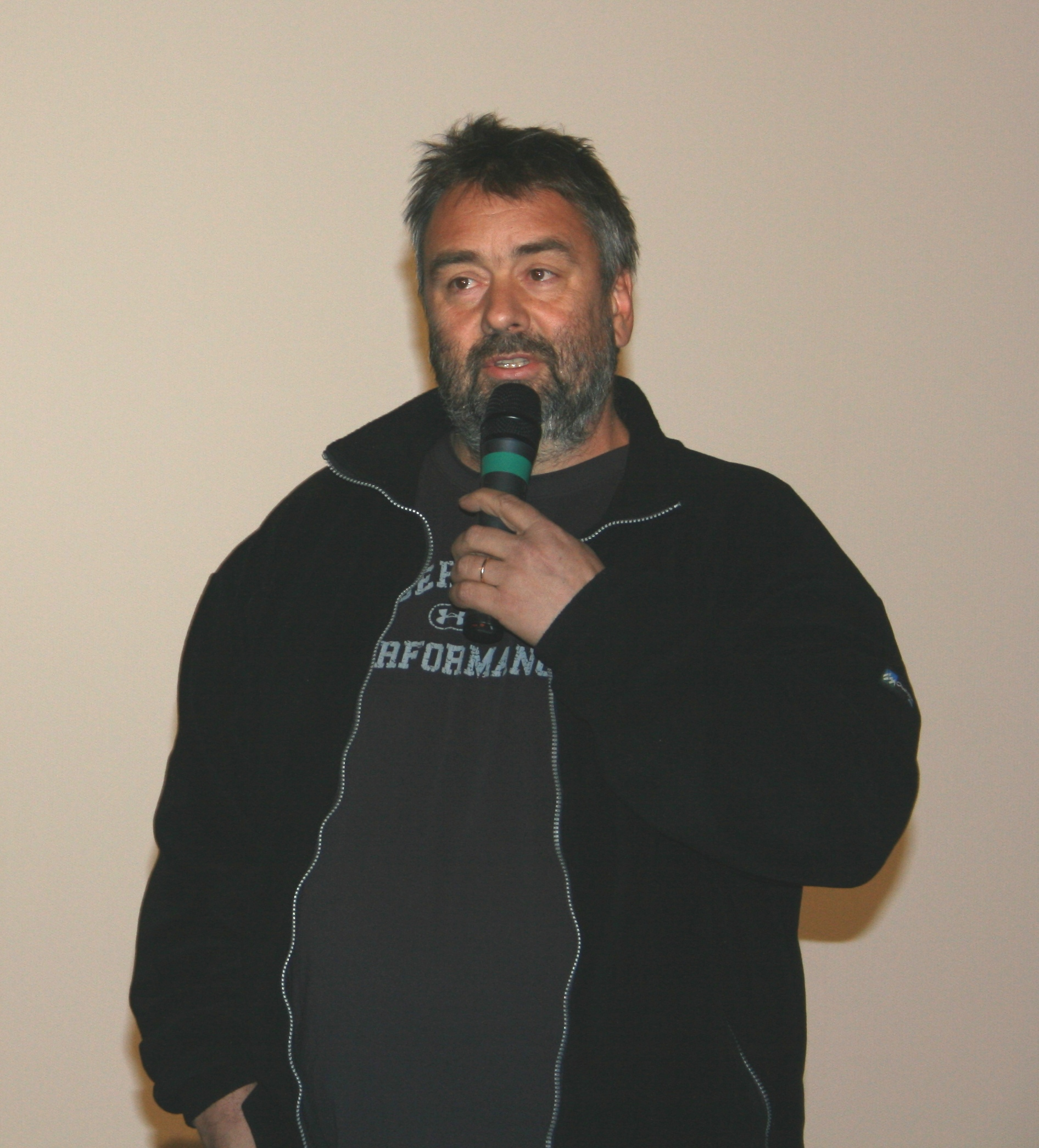 Luc Besson à l'avant-première de Taken diffusée à l'UGC Ciné Cité Les Halles, à Paris.